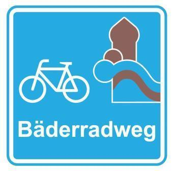 Deutschland - Baden-Württemberg/Bayern: Logo des "Schwäbischen Bäderradwegs"